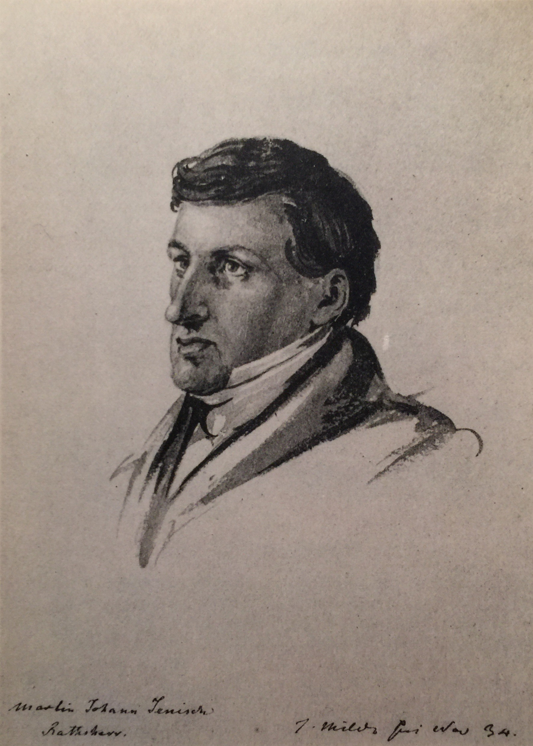 Martin Johann Jenisch der Jüngere. Aquarellskizze von Carl Julius Milde, signiert: Martin Johann Jenisch Rathsherr. J. Milde feci Nov 34.